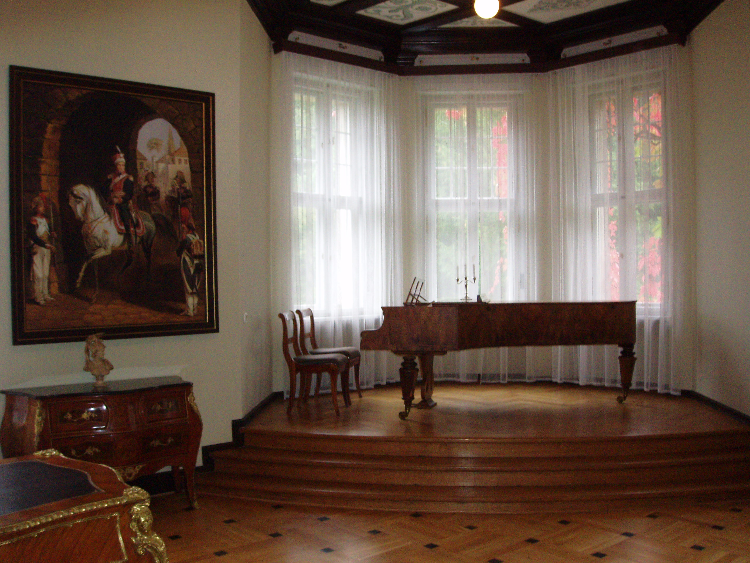 Wnętrze pałacu w Łężanach